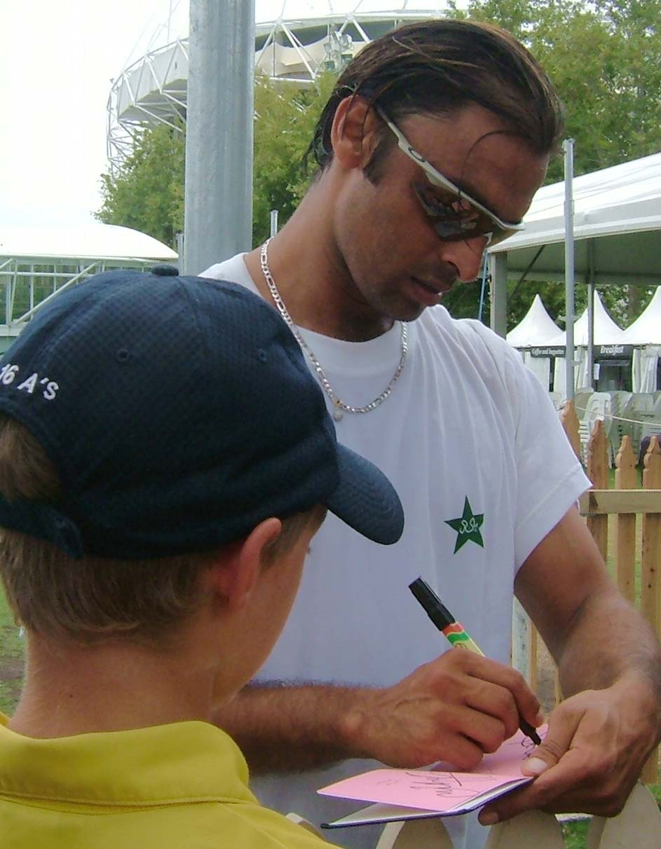 Pakistani Cricketer